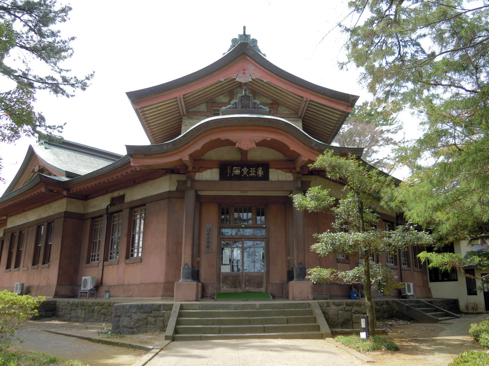 山形県酒田市日吉町にある酒田市立光丘文庫本館の正面玄関